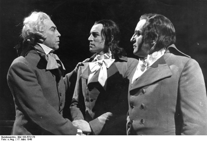 Staatsoper Hamburg, "Dantons Tod" Illus-dpd Grosse Begeisterung um die Oper "Dantons Tod" in Hamburg Die von Günther Rennert inszenierte Choroper Gottfried von Einems "Dantons Tod" erlebte am 17. März 1948 in der Hamburger Staatsoper ihre erste Aufführung in Deutschland. Sie wurde vom Publikum begeistert aufgenommen. Unser Bild zeigt v.l.n.r. Georges Danton (Matthieu Ahlersmeyer) – Camille Desmoulins (Richard Holm) – und Hérault de Séchelles (Peter Markwort), die drei Deputierten, die auf Veranlassung Robespierres hingerichtet wurden. 18-3-48 1290-48 Abgebildete Personen: Ahlersmeyer, Mathieu: Kammersänger, Bundesrepublik Deutschland